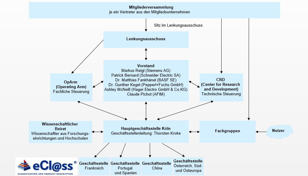 Das Organigramm zeigt die Struktur des Vereins